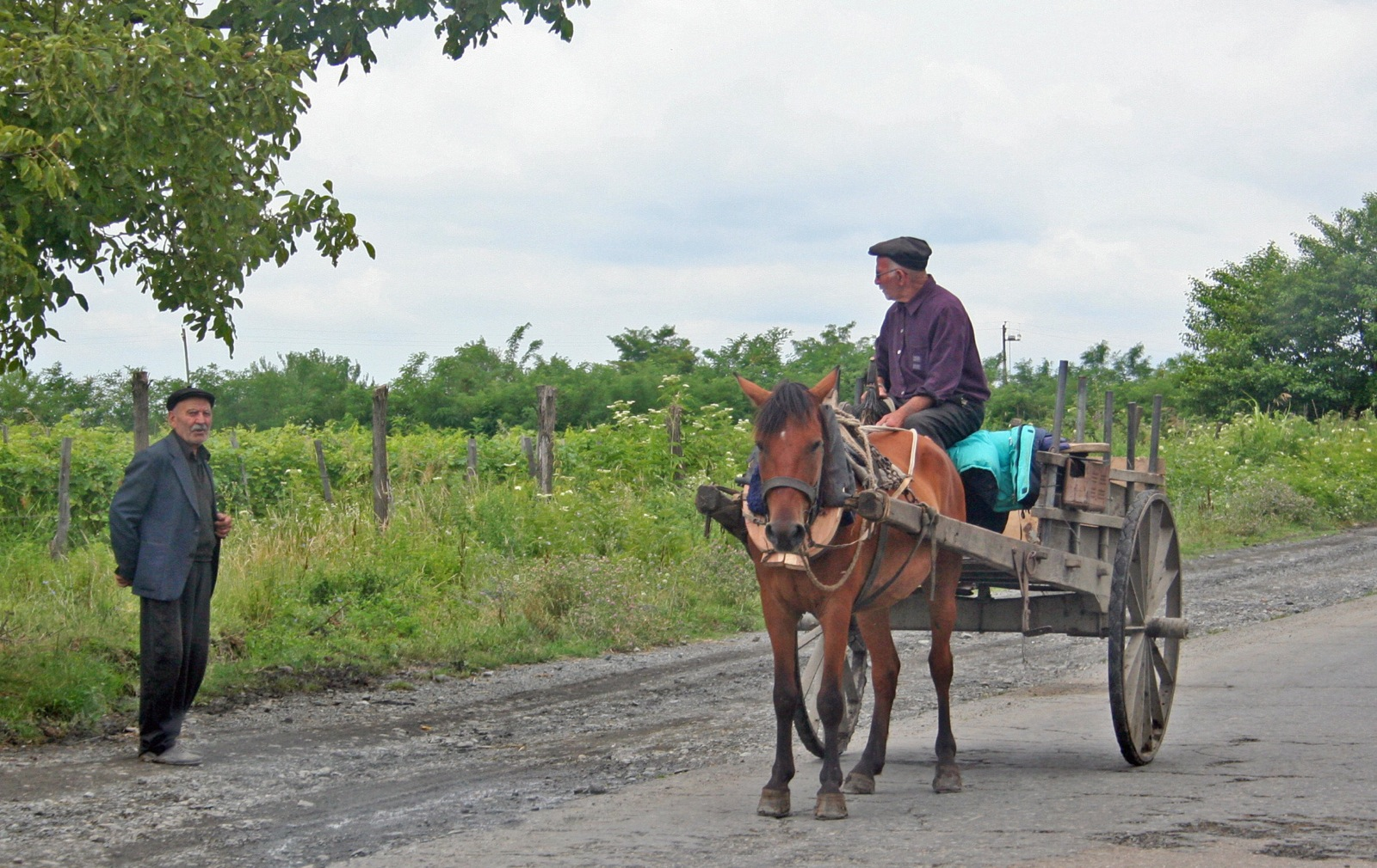 Kachetia (between Kvareli and Gremi)